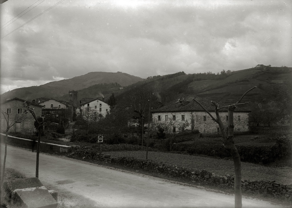 Título original: Caseríos de Idiazabal con la iglesia al fondo (1/1) Localización: Idiazábal (Guipúzcoa)